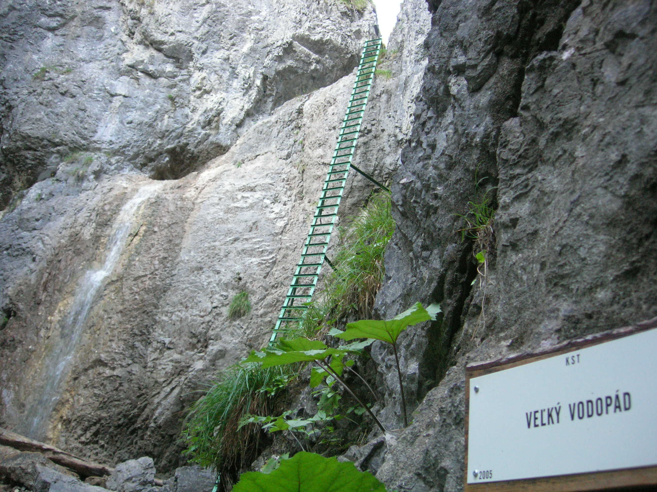 Slovenský Raj